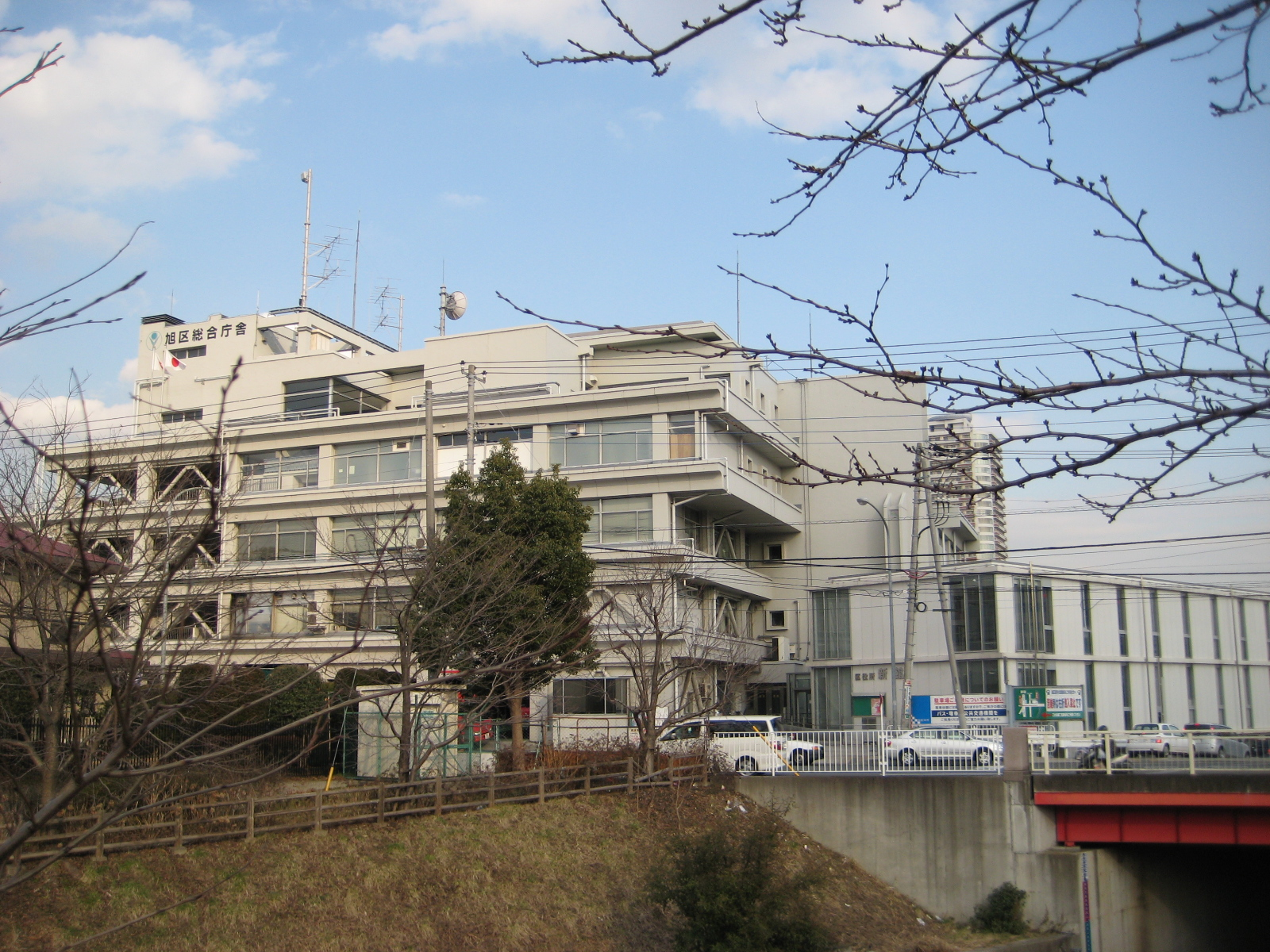 Asahi-ku Ward Office, Asahi-ku, Yokohama, Kanagawa, Japan (旭区役所)